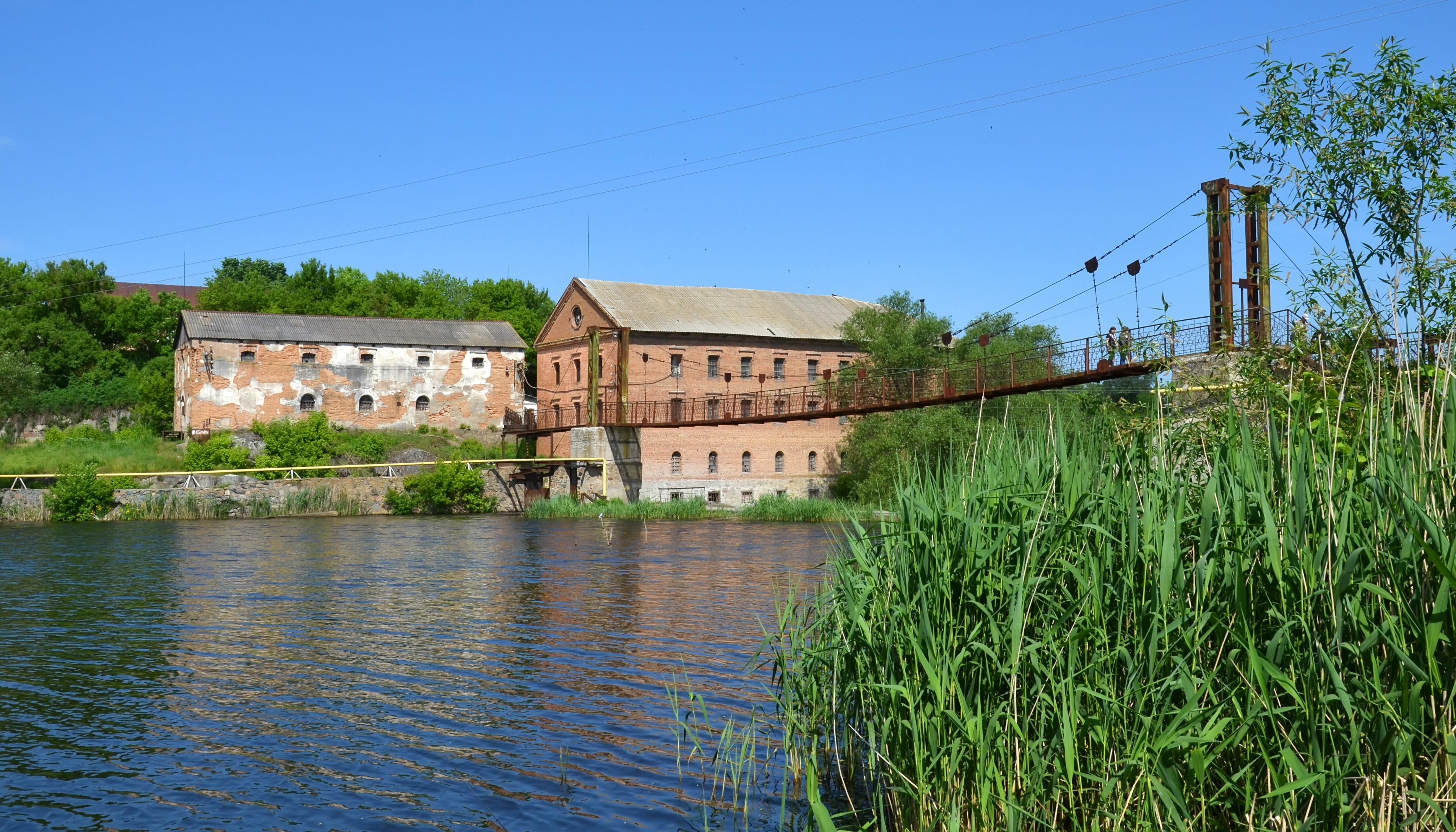 Вантовий (підвісний) місток, село Щербаки, між селами Щербаки Білоцерківського і Городище-Пустоварівське Володарського районів